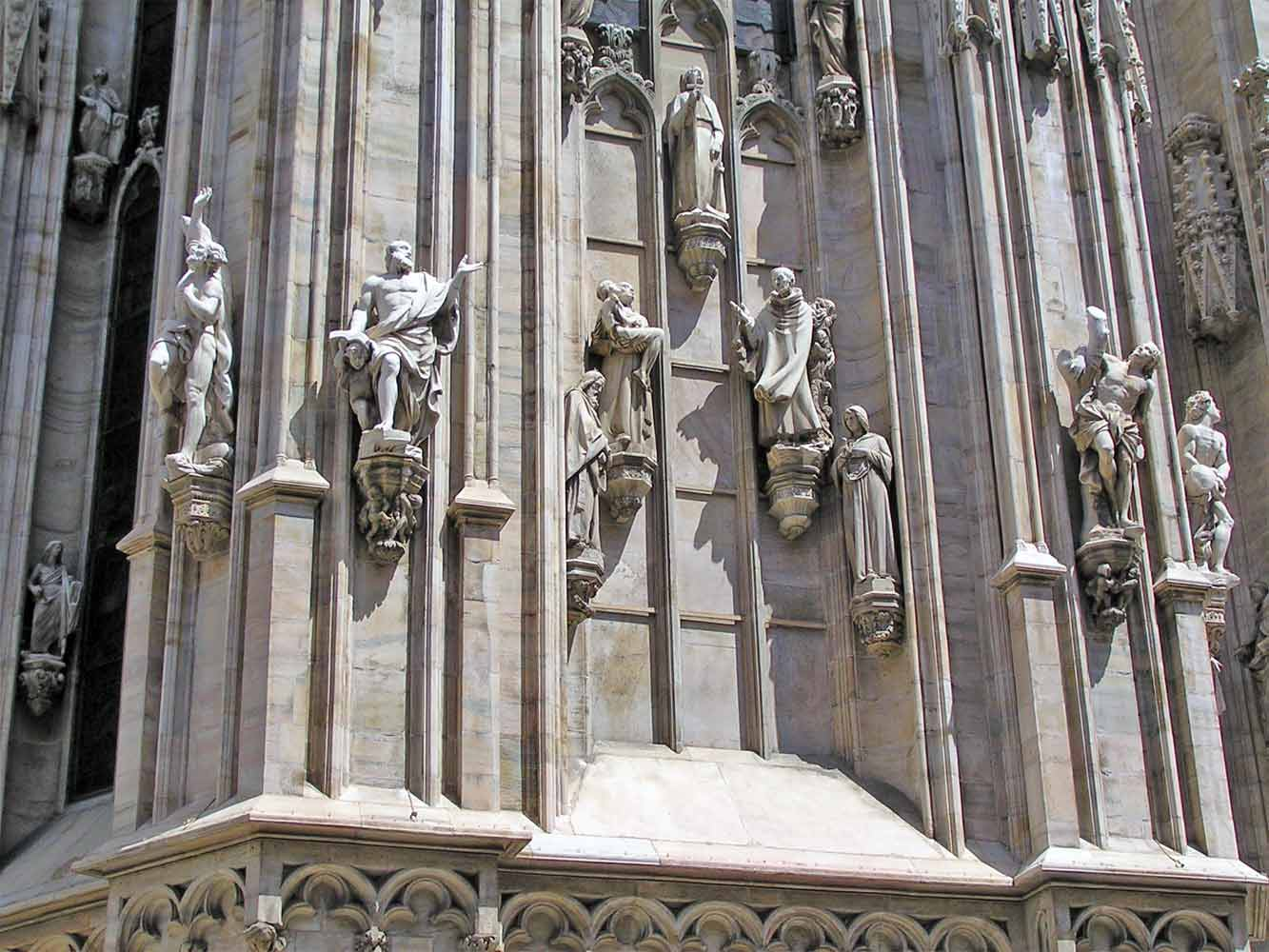 Details der Fassade des Doms von Mailand Please send reference and voucher copy to BMK(at)clever.ms Bitte Quellenangabe und Beleg an BMK(at)clever.ms